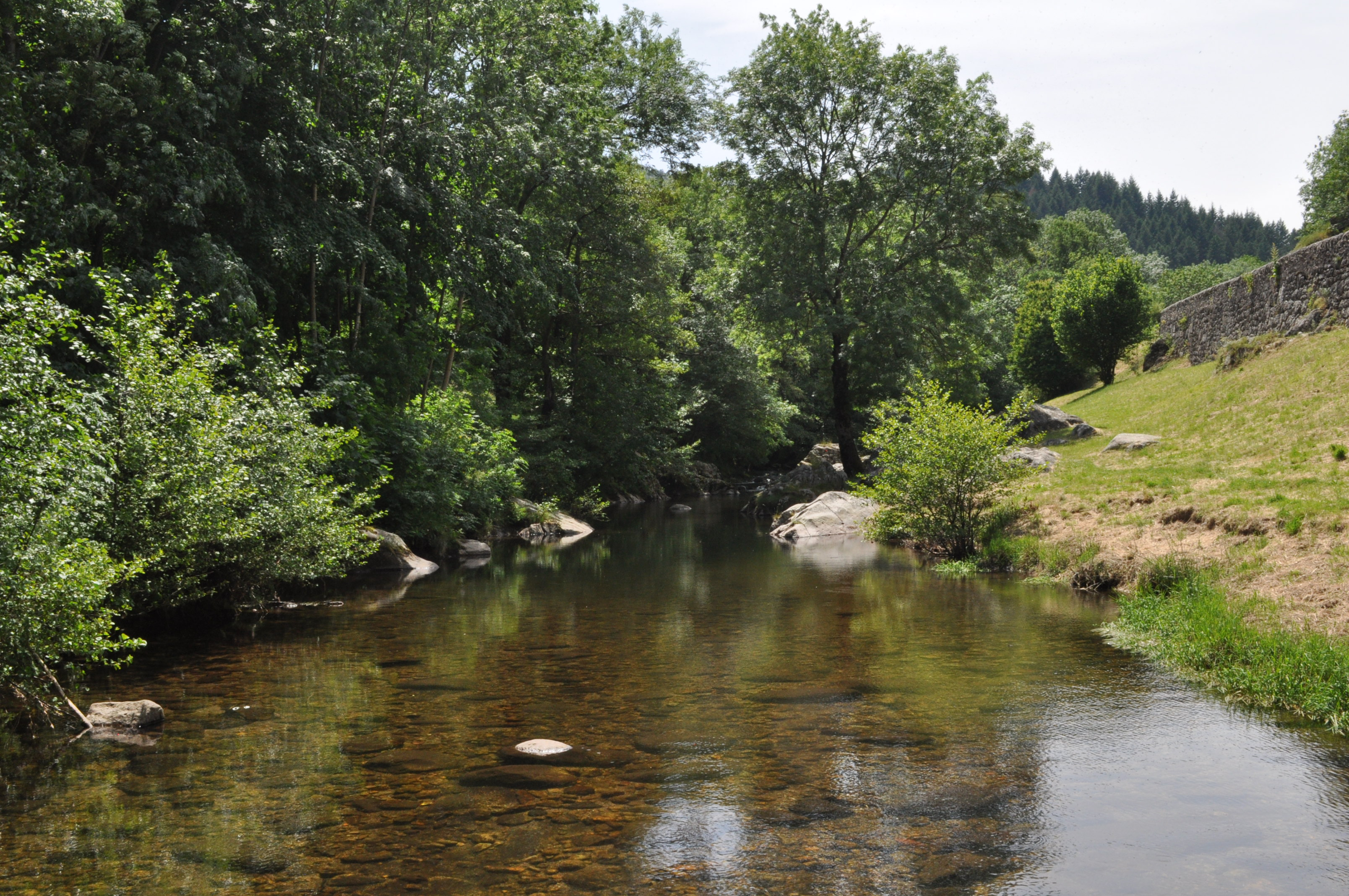 La rivière Glueyre à l'Ouest d'Albon-d'Ardèche, au niveau du Barry